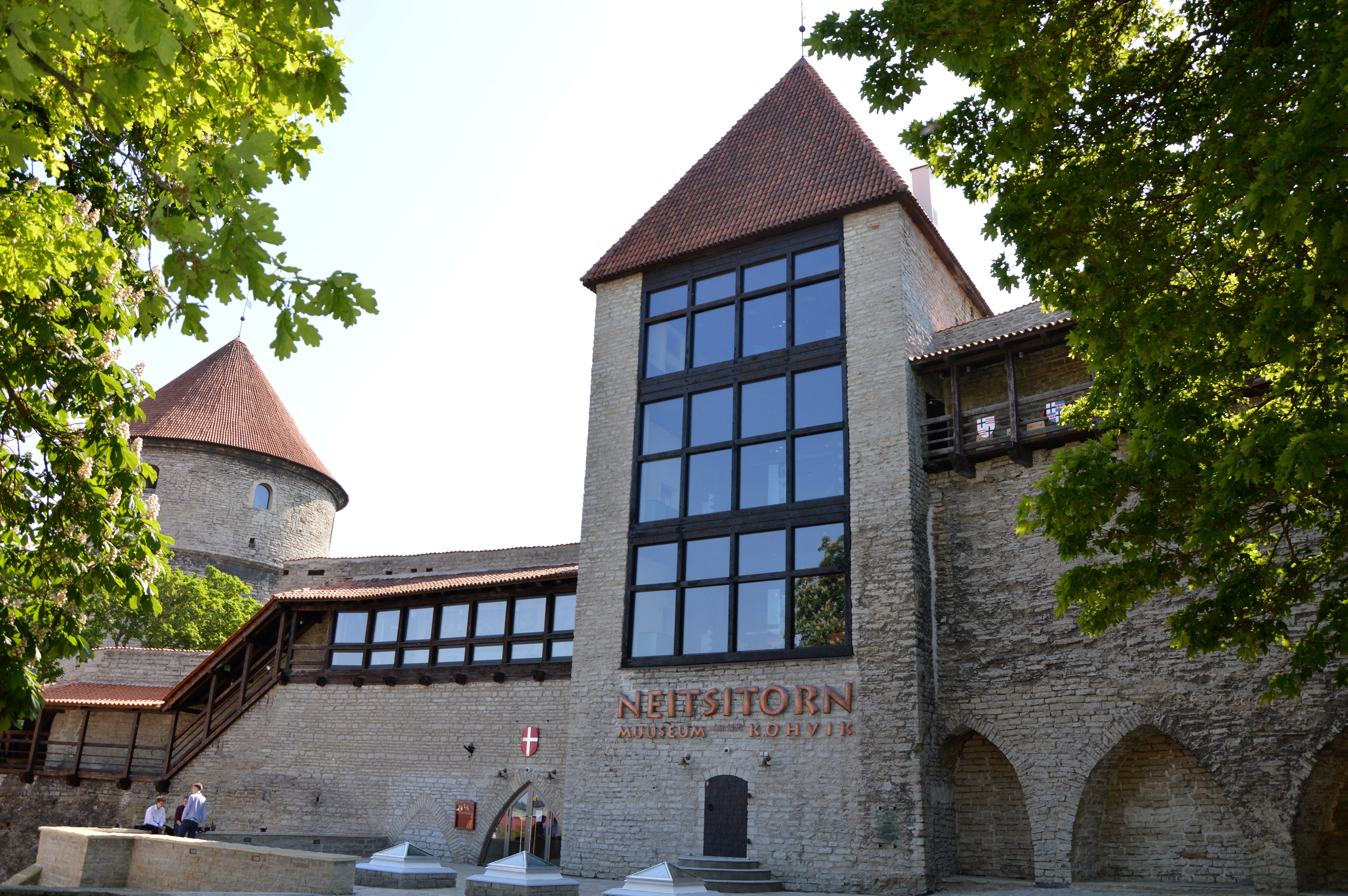 Neitsitorn